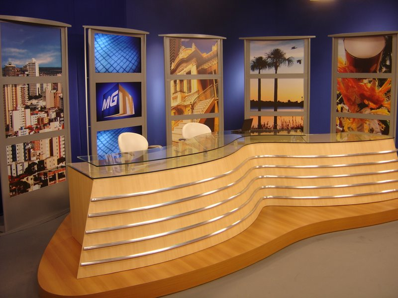 Cenário antigo do MGTV, lançado em 2009, pela TV Integração em Uberlândia